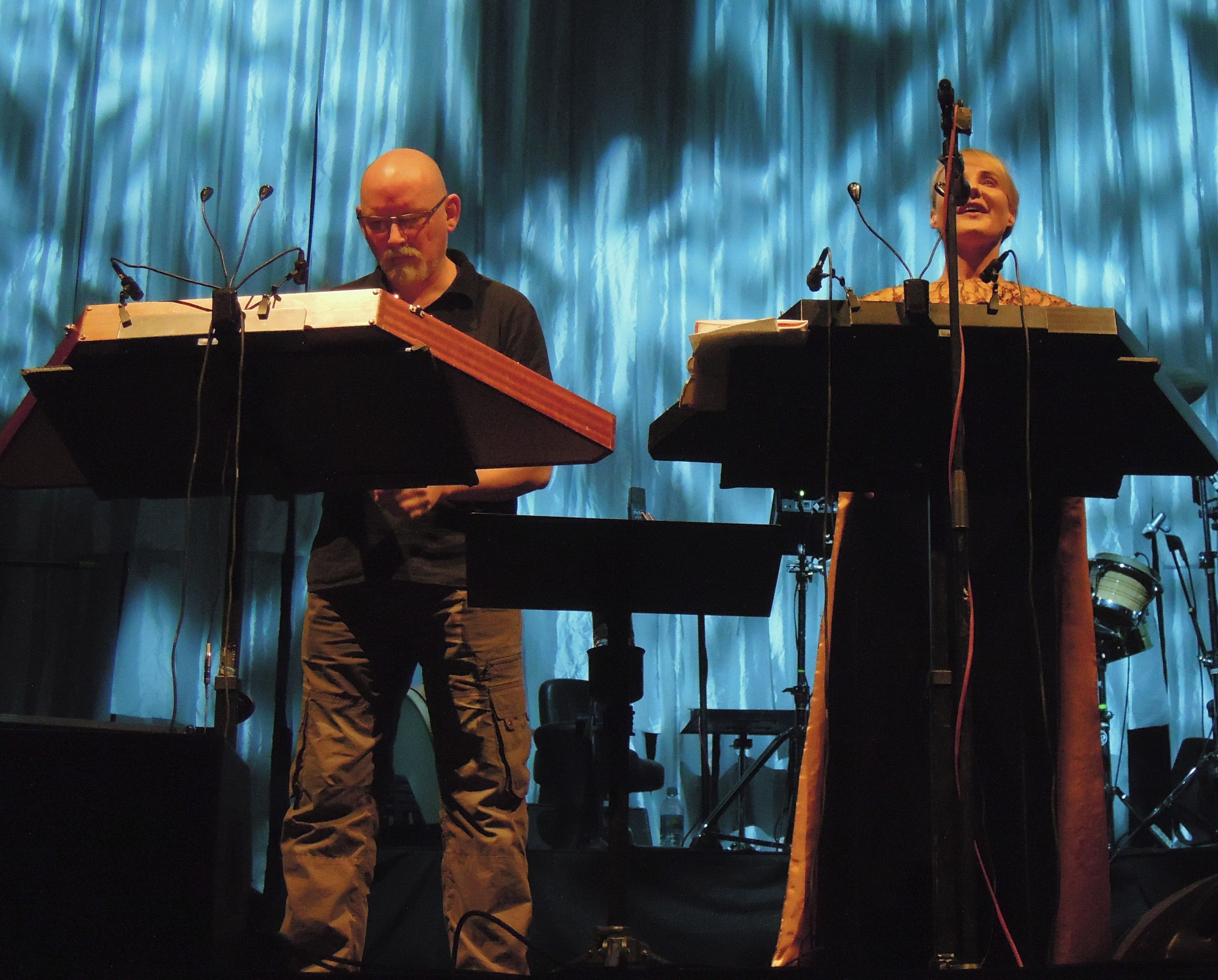 Presentación de Dead Can Dance en la Ciudad de México el 27 de noviembre de 2012.